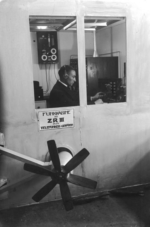 Eröffnung der großen Funk-Ausstellung am Kaiserdam. Die nachgeahmte Funkkabine des Z.R. 3. welche sich wunderbar während der Überfahrt nach Amerika bewährte.